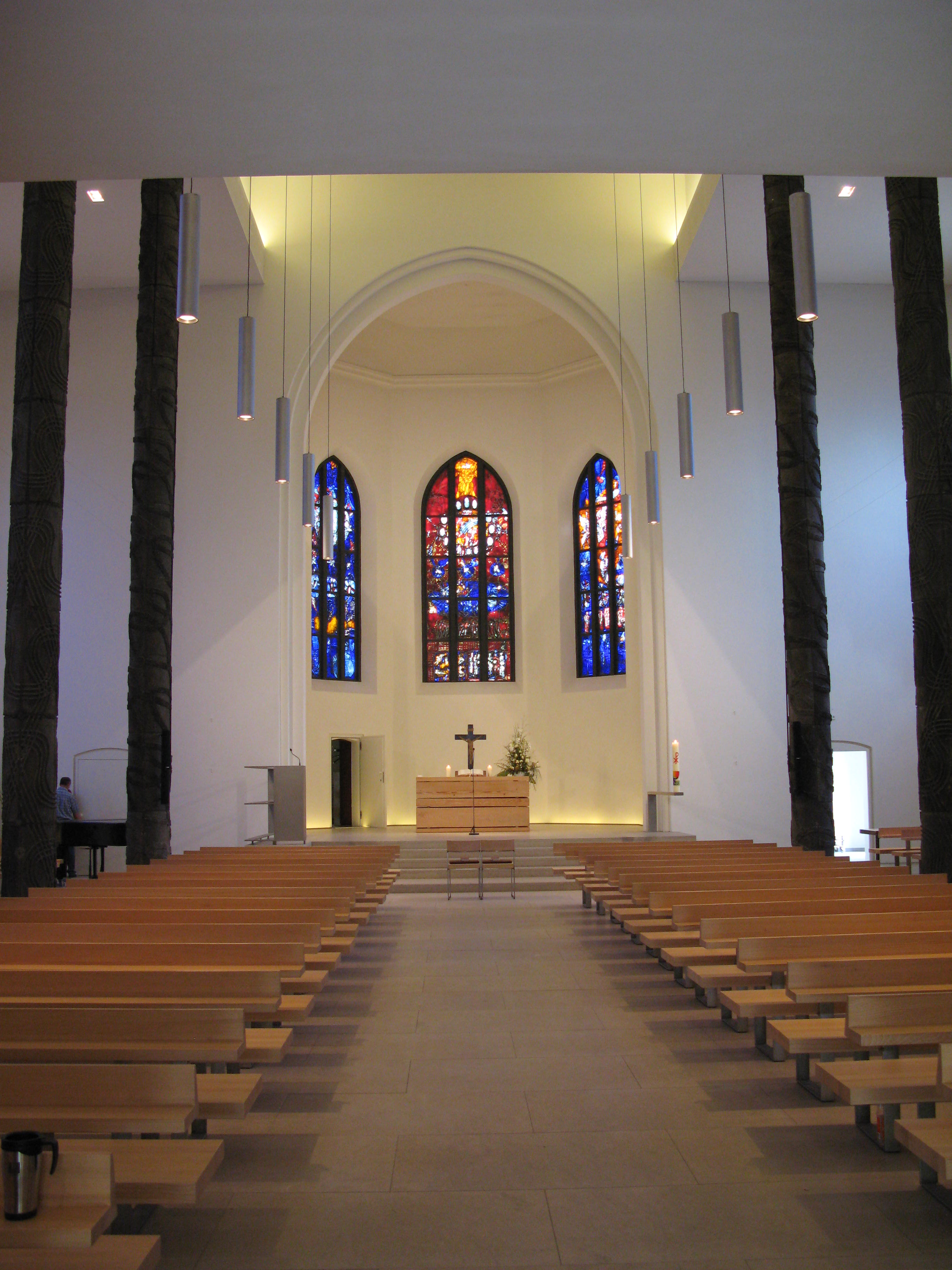 Innenraum der evangelischen Matthäuskirche in Mannheim-Neckarau